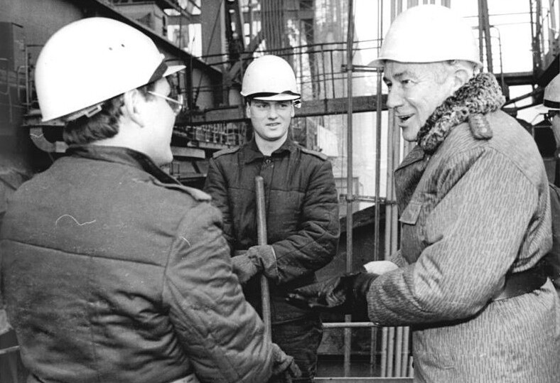 Tagebau Nochten, Hoffmann mit NVA-Soldaten ADN-ZB Weisflog 18.1.85 Bez.Cottbus: Verteidigungsminister im Tagebau Nochten- Von den hohen Leistungen der Angehörigen der NVA und der anderen bewaffneten Organe an der Seite der Berg-und Energiearbeiter überzeugte sich Armeegeneral Heinz Hoffmann, Mitglied des Politbüros des ZK der SED und Minister für Nationale Verteidigung, im Großtagebau Nochten. An der 60-Meter-Förderbrücke unterhielt sich der Minister mit den Soldaten Volker Lautenschläger und Joachim Haubold.